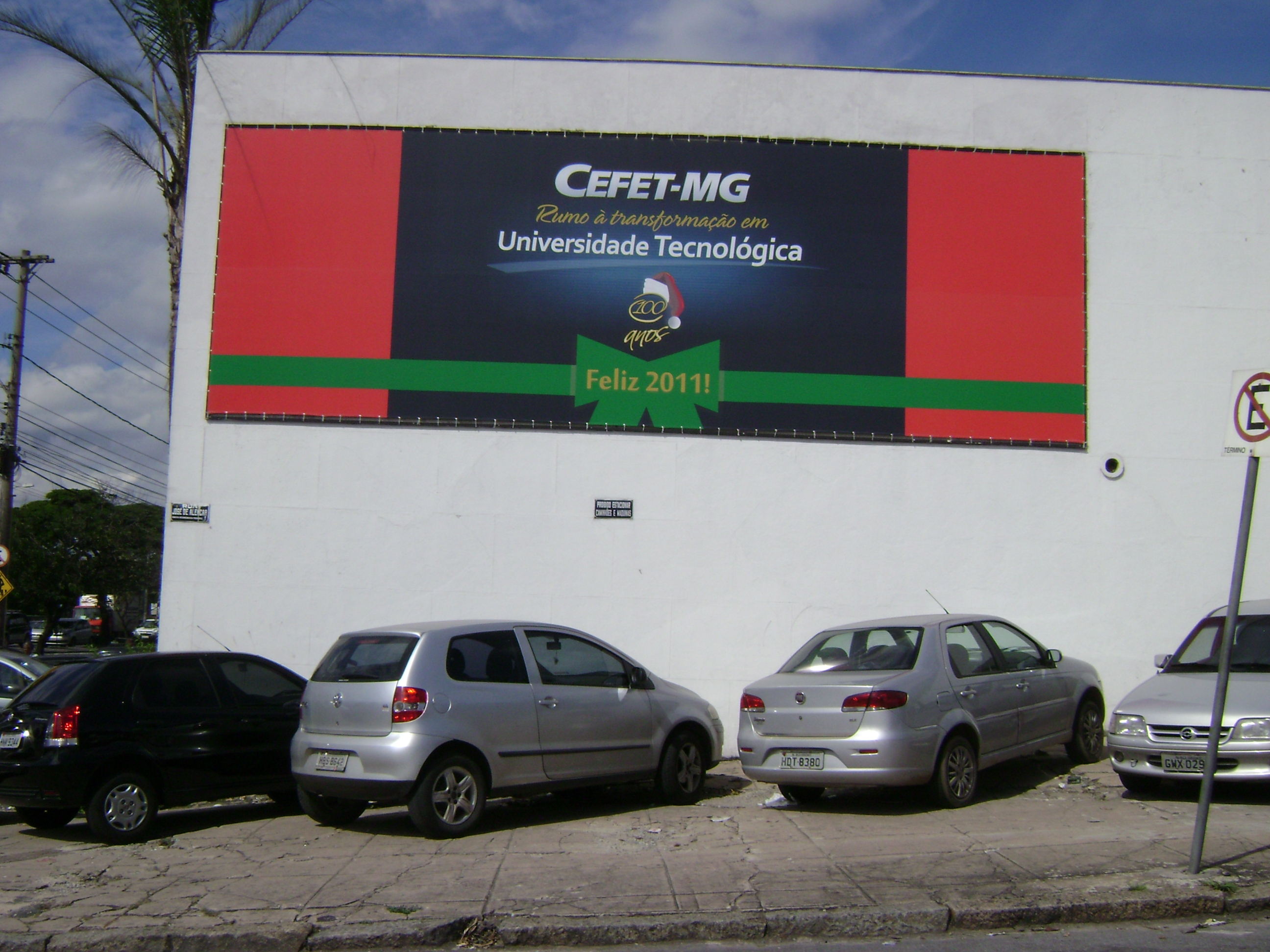 Inscrição na parede do campus I do Cefet-MG.